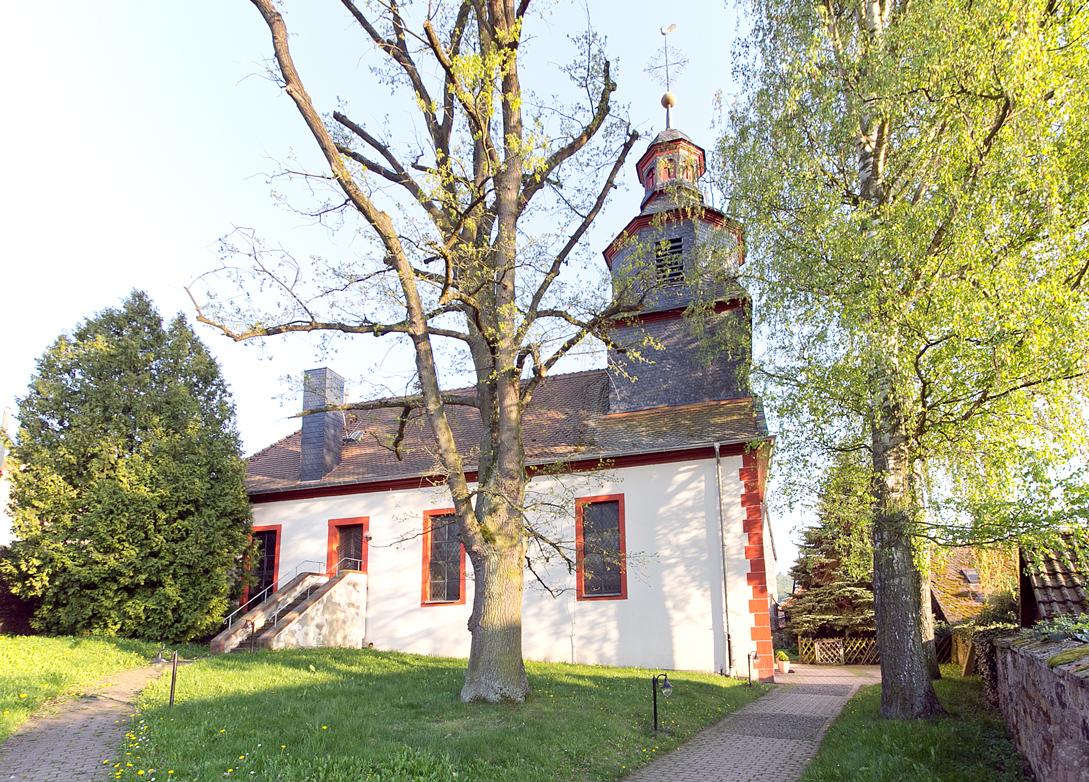 Evangelische Kirche in Ranstadt im Wetteraukreis, Deutschland.